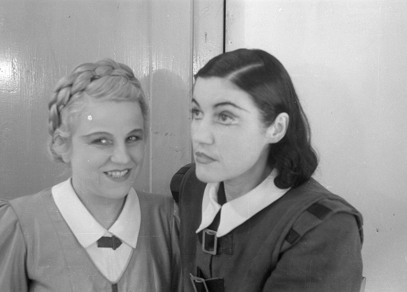 Original image description from the Deutsche Fotothek Szenenbilder